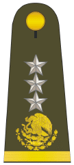 Pala de General de División del Ejército Mexicano